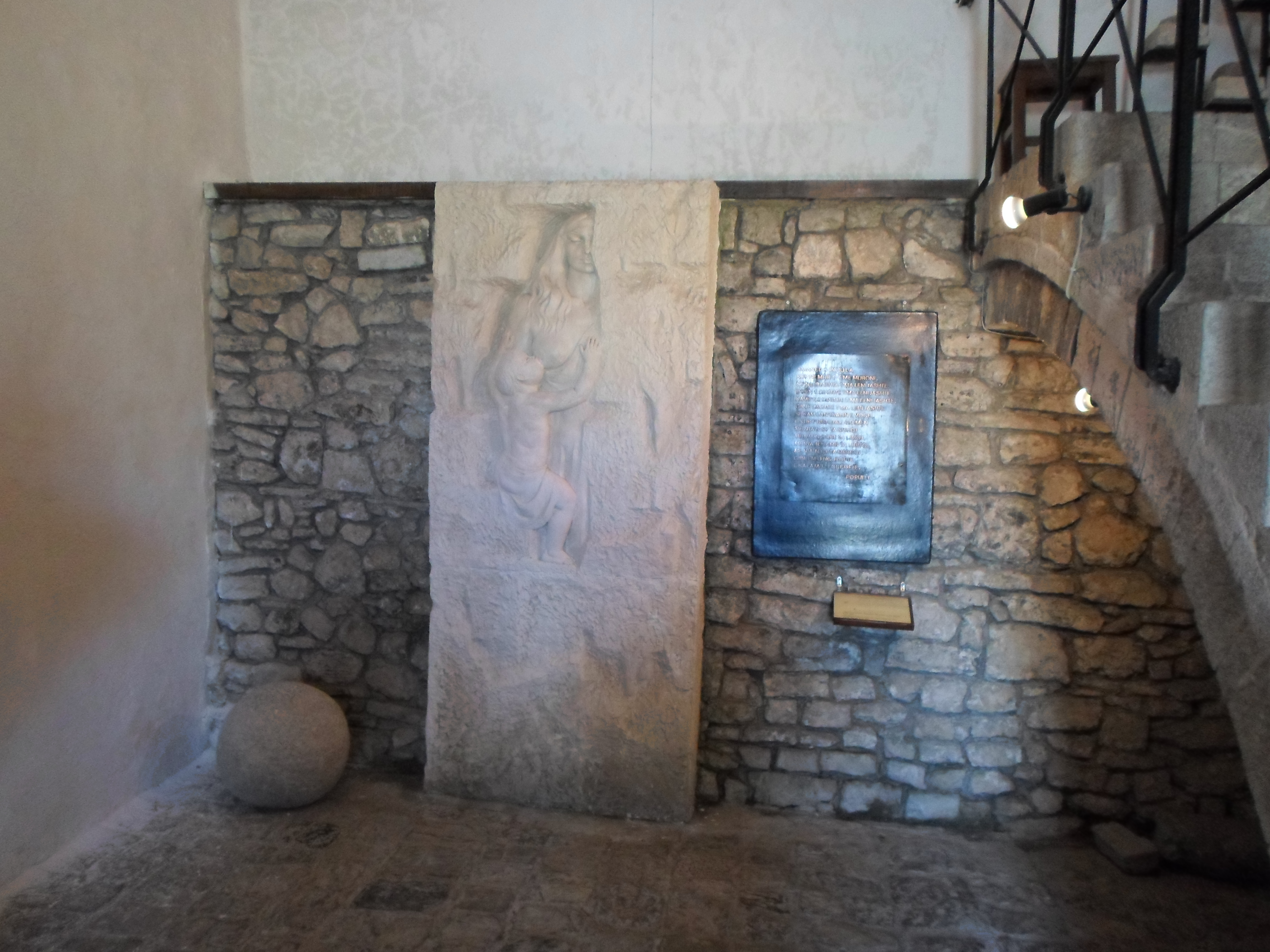 Aceasta csulptura se afla in interiorul Cetatii Rozafa